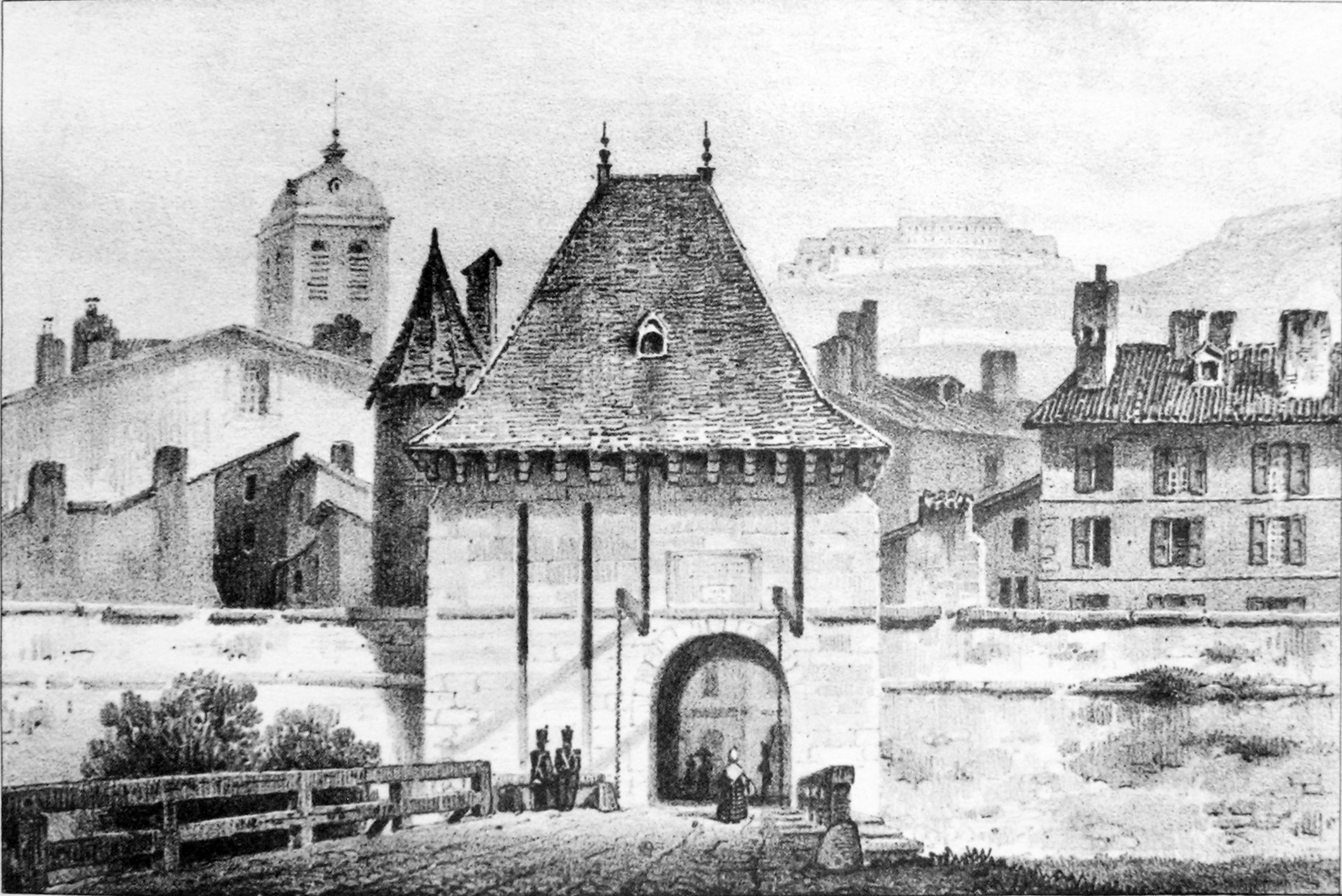 Porte de Bonne à Grenoble ATTENTION ! Ce facsimilé est réalisé en applicant des alterations avec un logiciel graphique à une copie numérique, obtenue à partir d'une prise de photo faite par un non-professionnel. Elle pourrait ne pas être parfaitement réussie.